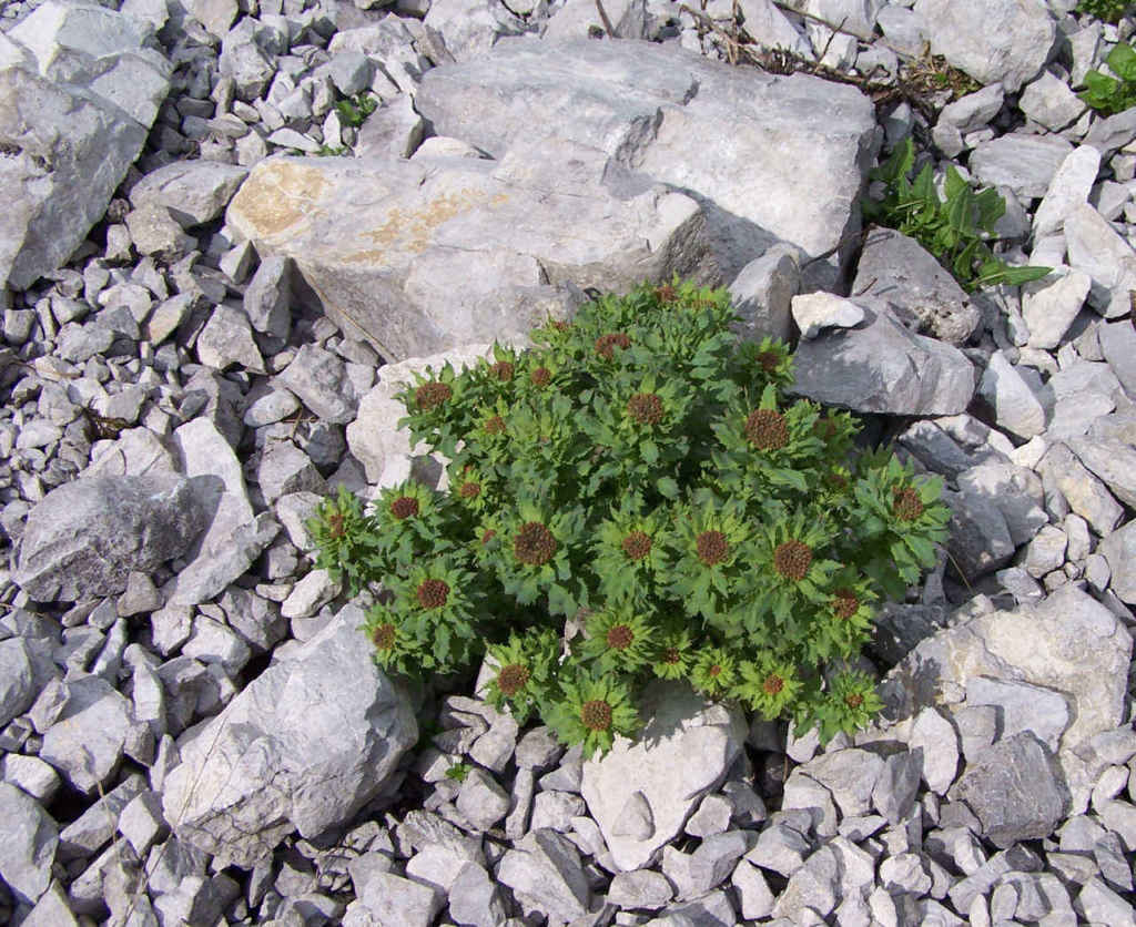 Bienfaits de la rhodiola rosea: La rhodiola est une plante adaptogène qui possède de nombreux bienfaits sur le corps mais également sur l'esprit et les capacités cognitives. Ce complément alimentaire est également très appréciée des sportifs.